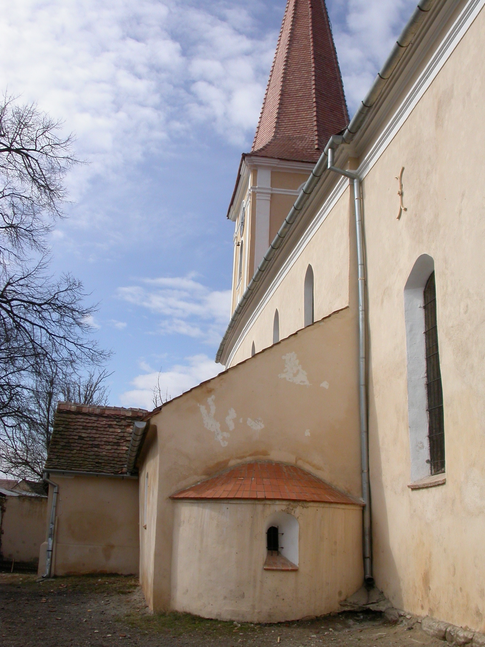 Ansamblul bisericii evanghelice fortificate, sec. XIII-XIX